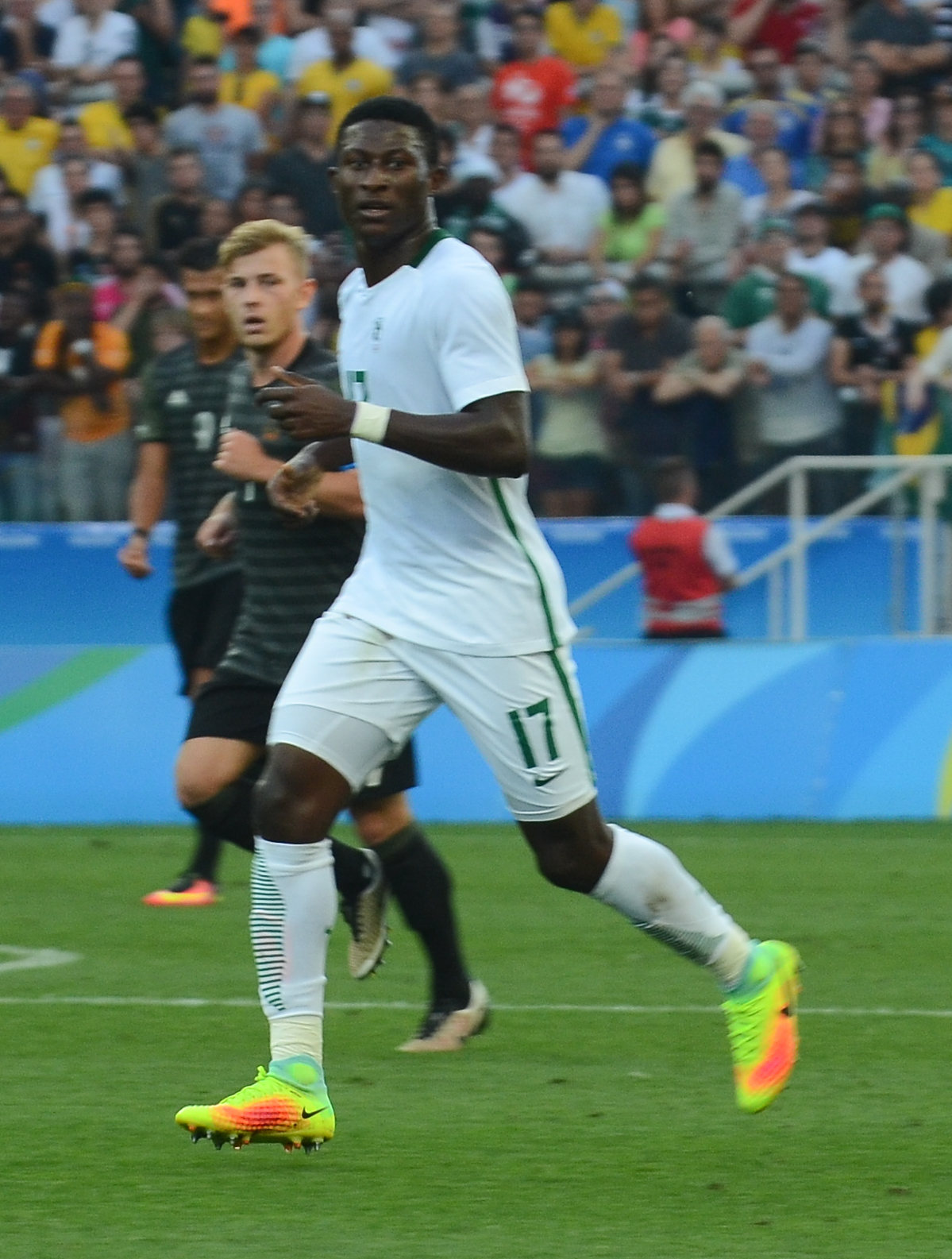 São Paulo - Alemanha vence a Nigéria por 2 a 0 e se classifica para a final na Arena Corinthians (Rovena Rosa/Agência Brasil)